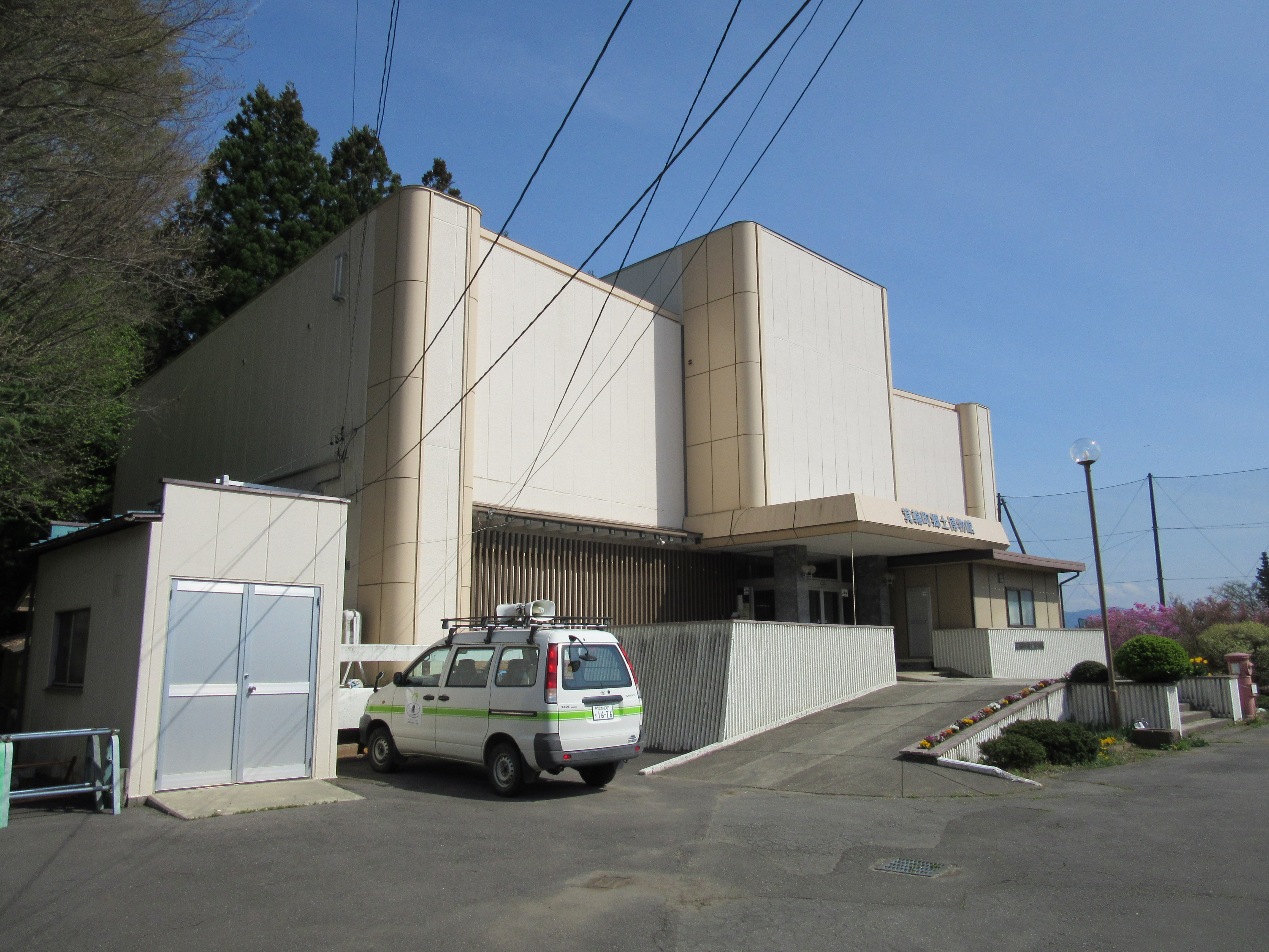 箕輪町郷土博物館